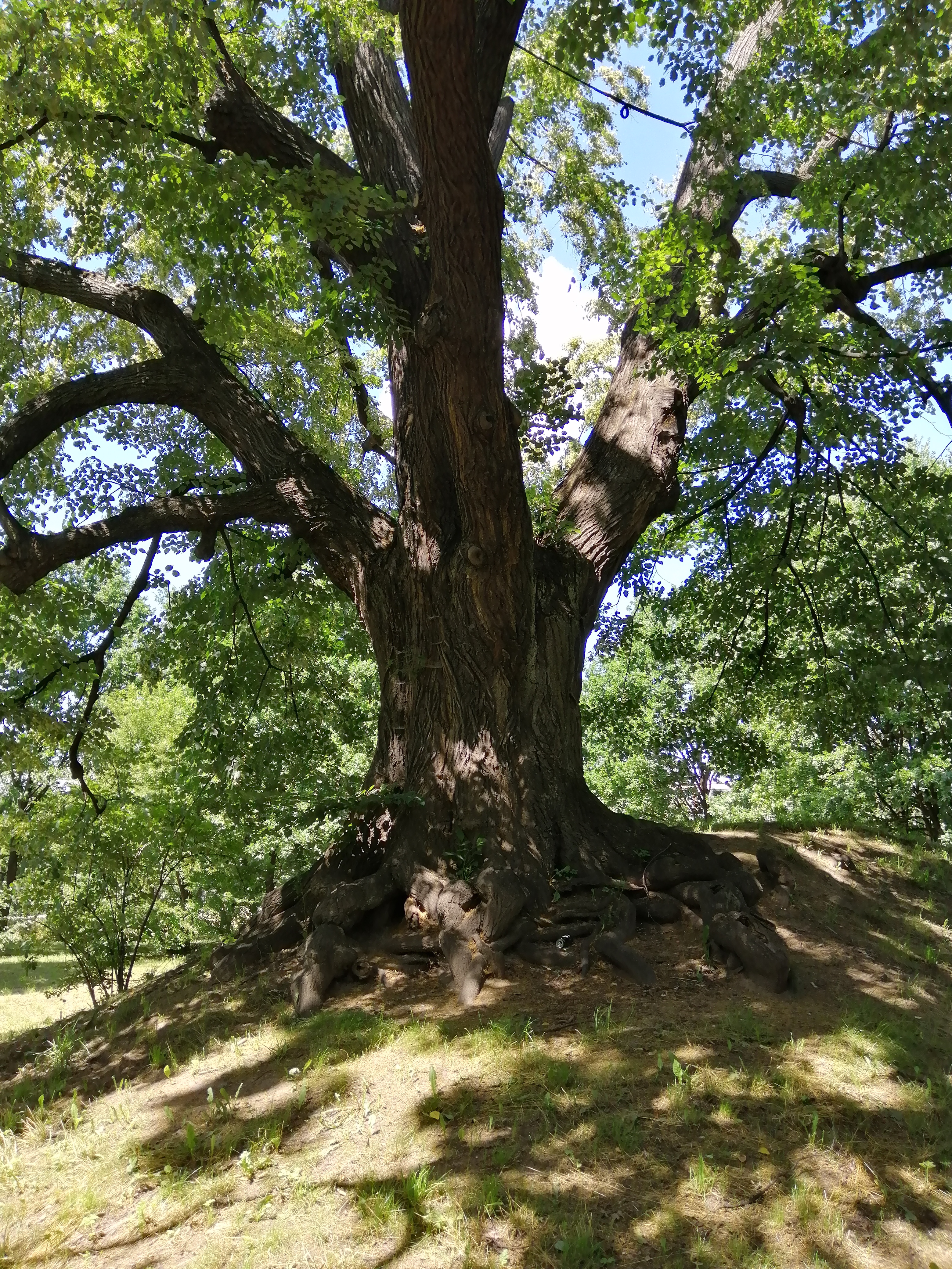 Gródek stożkowaty z XIV i pocz. XV w. z Tarnowskich Gór – Starych Tarnowic (stanowisko 8, AZP 94-46/1)